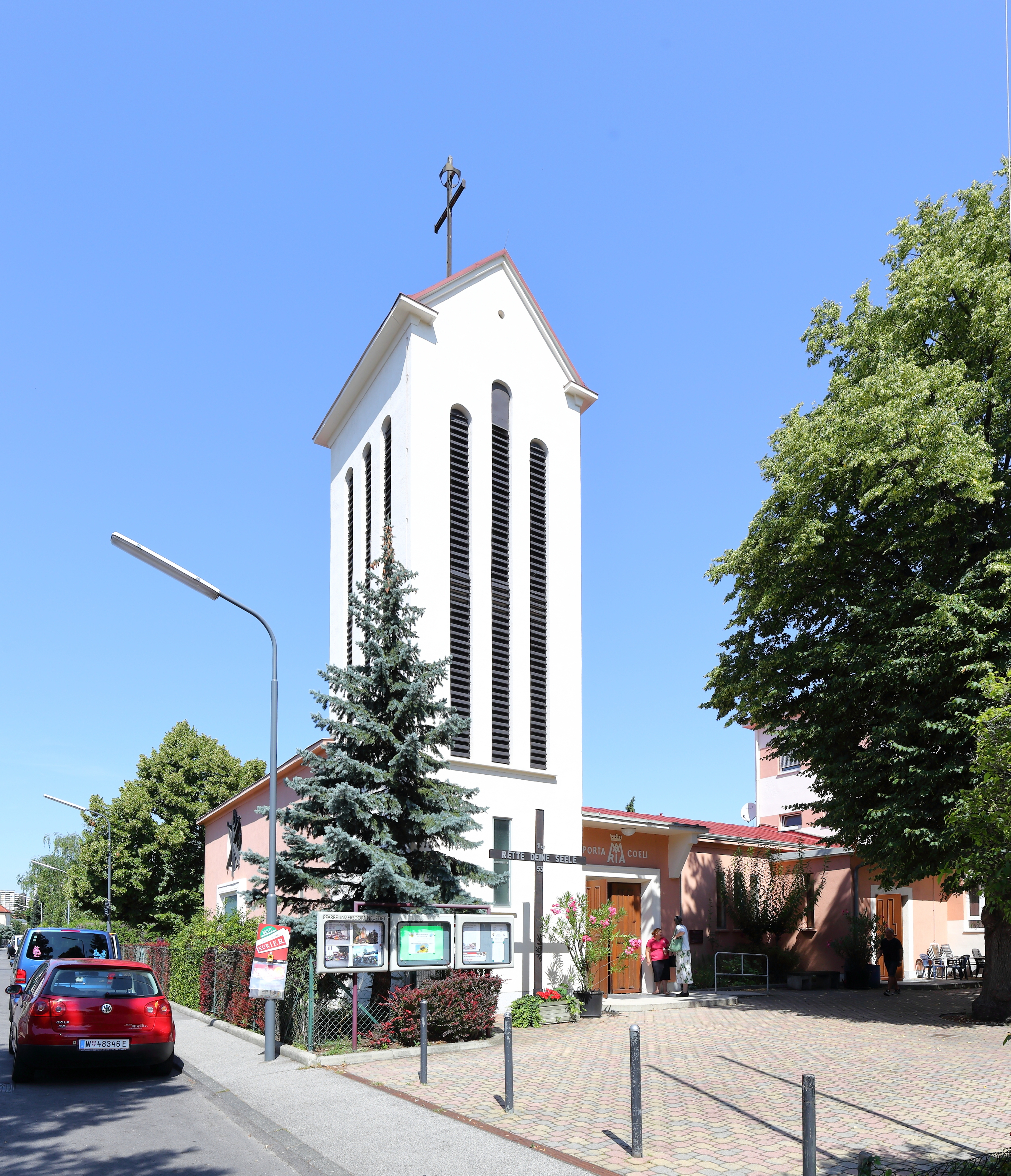 Südostansicht der Pfarrkirche Inzersdorf-Neustift im 23. Wiener Gemeindebezirkes Liesing. Ursprünglich ab 1931 nach Plänen des Architekten Hans Prutscher als Notkirche in der Größe von 27 mal acht Metern errichtet. 1948 wurde nach Plänen von Josef Vytiska ein Turm angebaut. Später erfolgte noch der Anbau eines Seitenschiffes.